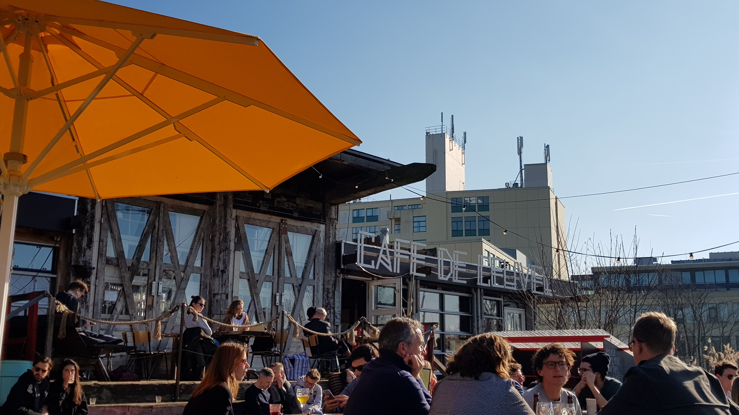 Projektgebiet "De Ceuvel" in Amsterdam-Noord